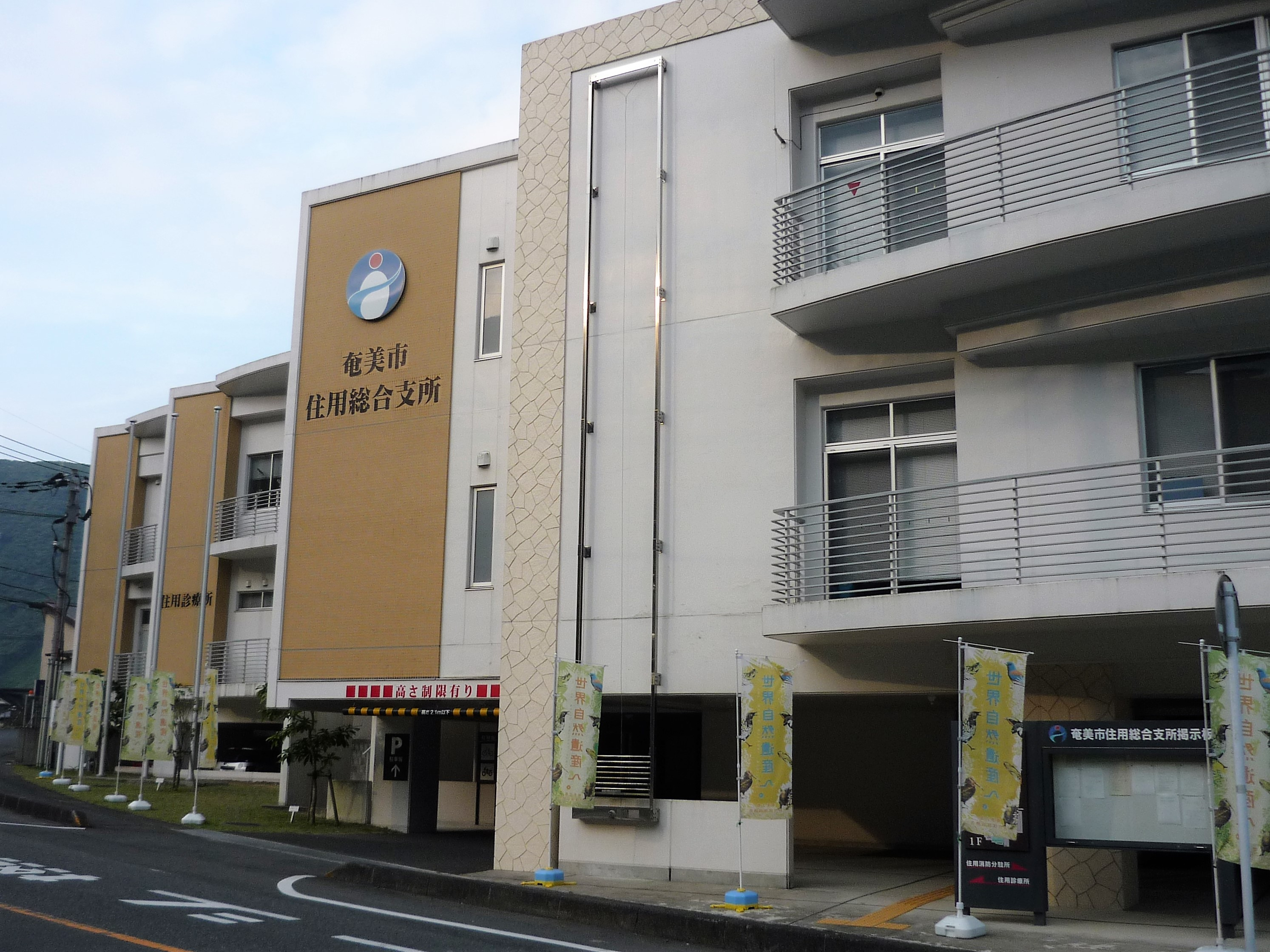 奄美市住用総合支所 Panasonic Lumix DMC-FS3